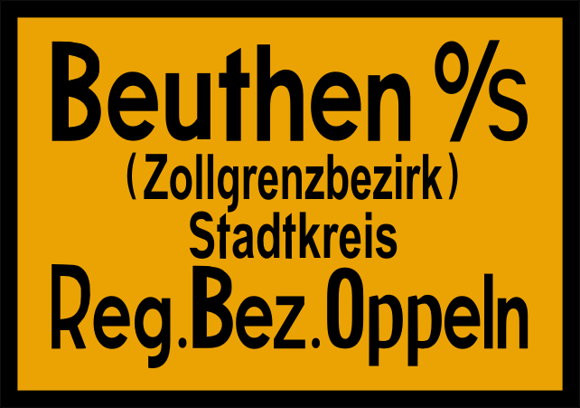 Ehemaliges Ortseingangsschild von Beuthen (Oberschlesien) aus der Zeit um 1939 mit Zusatz "Zollgrenzbezirk"